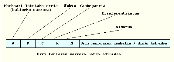 Memoria kudeketaren irudikapenak